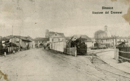 Binasco 1910